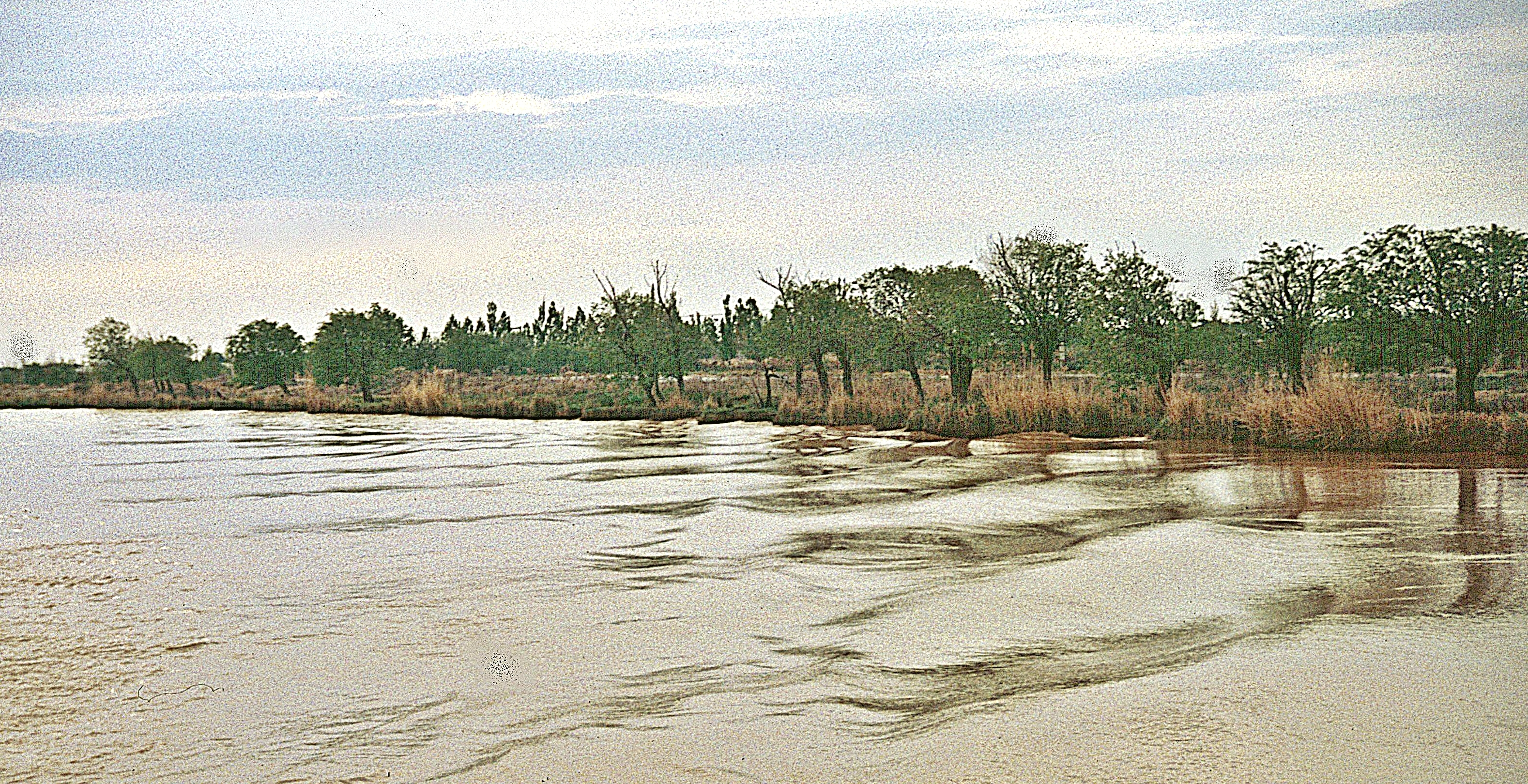 Karakum-Kanal